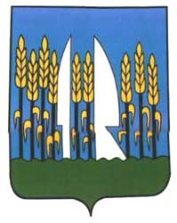 coat Budapest 21 district